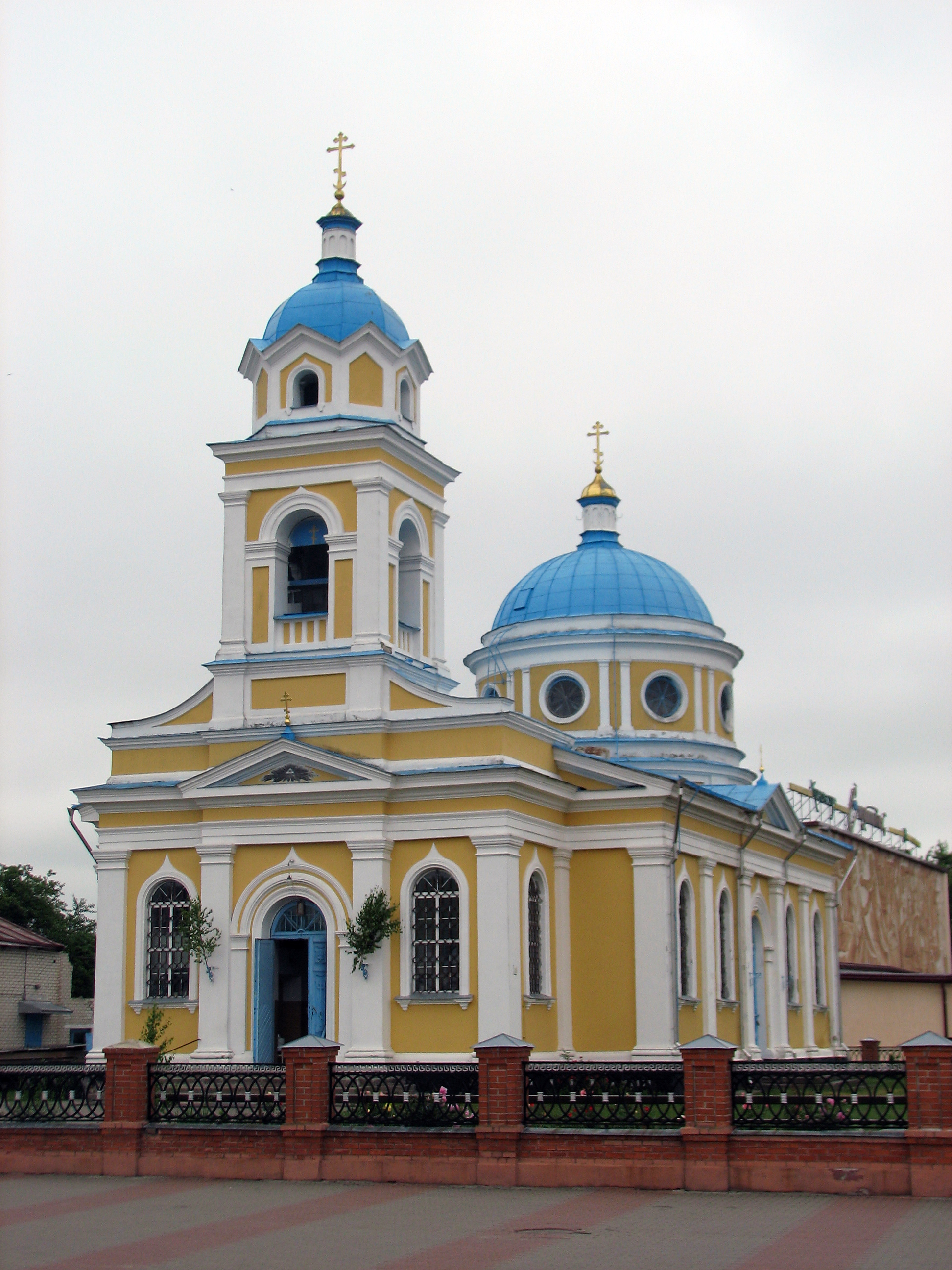 Беларуская (тарашкевіца): Сабор Аляксандра Неўскага (Пружаны)